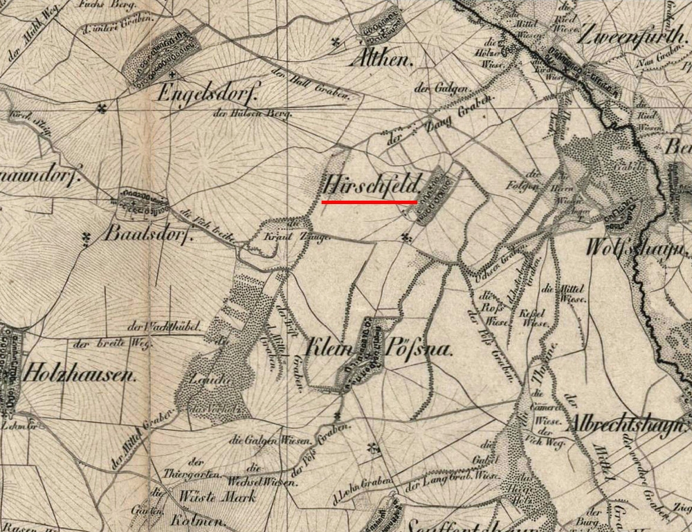 Hirschfeld auf einem Ausschnitt aus: Blatt 2 des Topographischen Atlas des Königreichs Sachsen : auf Befehl weiland Sr. Majestät des Königs Friedrich August aus der großen topographischen Landes-Aufnahme reducirt und bearb. bei der Königlichen Militair-Plankammer / bearb. von Oberreit. Gestochen von Bach. - 1:57 600. - Dresden 1836 -1860. - 1 Kt. in 22 Bl.